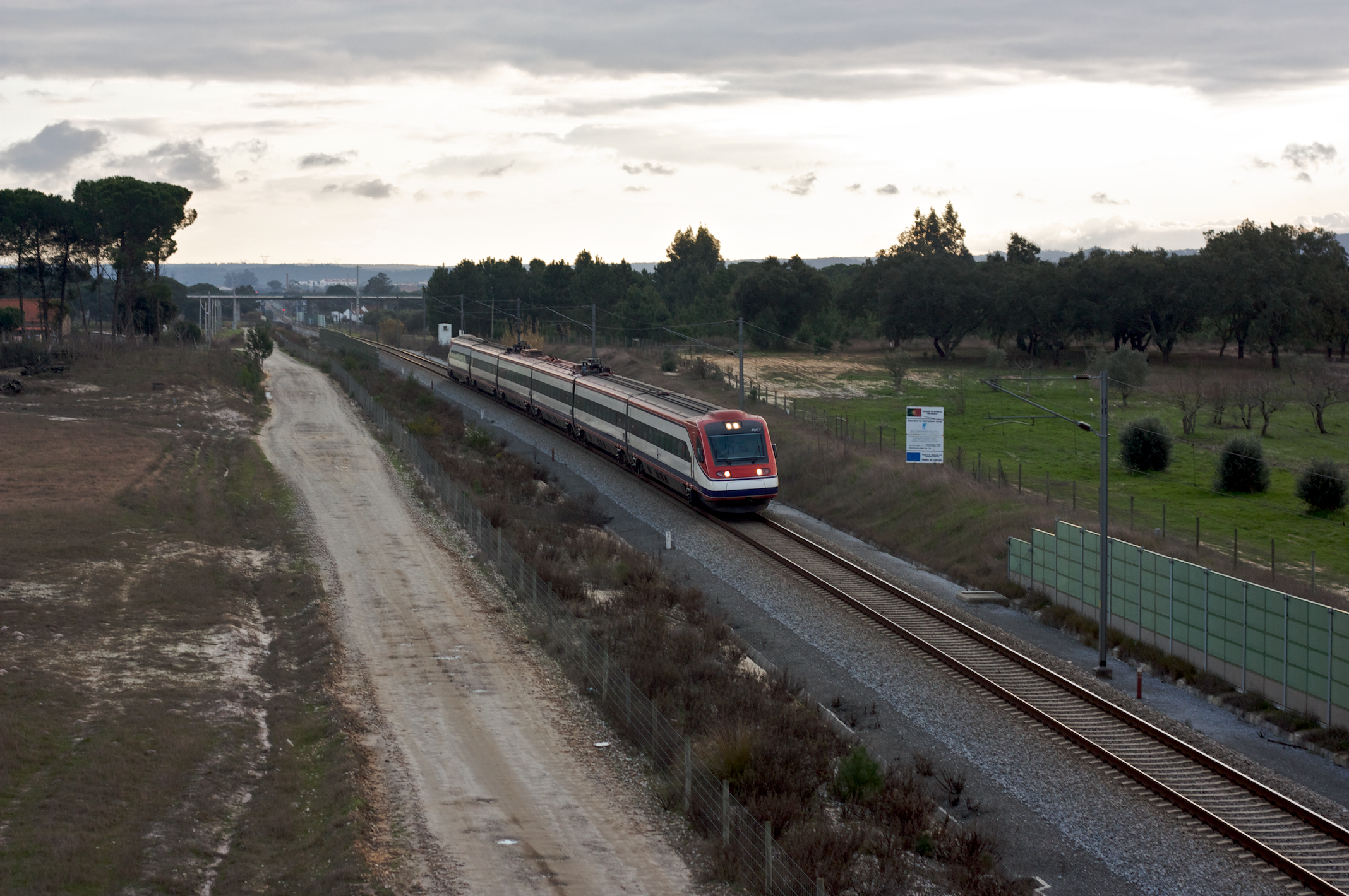 Tipo: Comboio Alfa Pendular 184 [Faro - Porto • Campanhã] Local: Grândola [Linha do Sul, PK 98] Data e hora: 4 de Janeiro de 2009 [16h44] Material: Automotora 4007 [Comboio de Pendulação Activa]